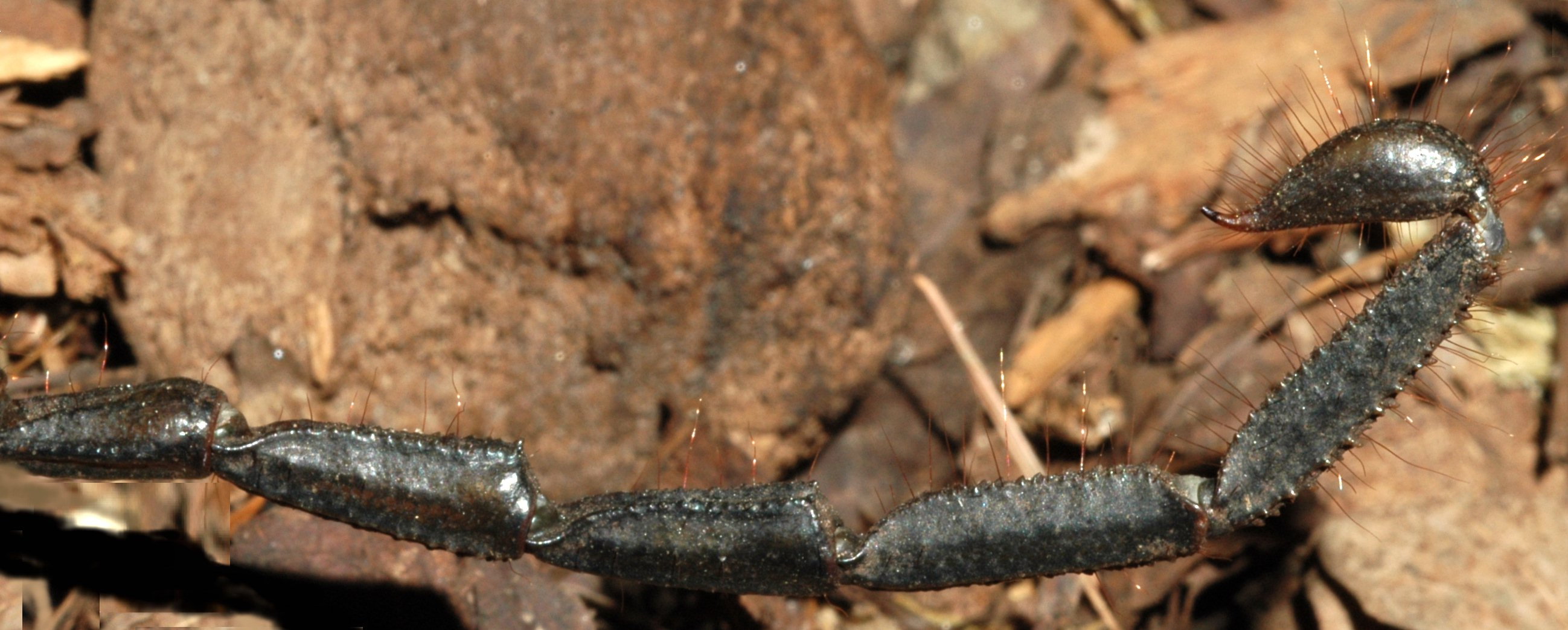 Hadogenes paucidens Pocock, 1896, Scorpiones, Hemiscorpiidae.